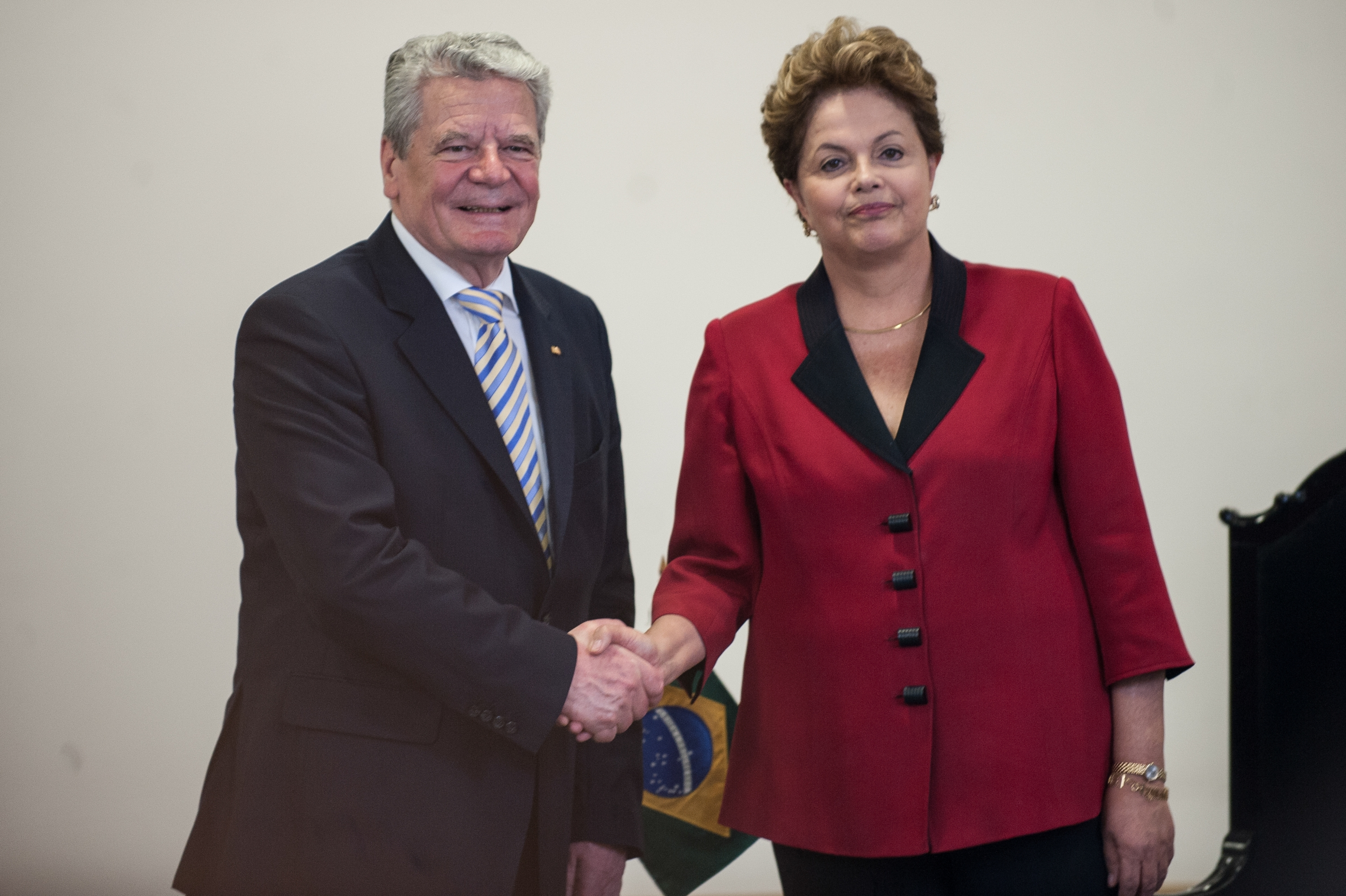 Os presidentes do Brasil, Dilma Rousseff, e da Alemanha, Joachim Gauck, participam abertura do 31º Encontro Econômico Brasil-Alemanha (EEBA), em São Paulo. Os participantes do evento discutirão as oportunidades de ampliação do comércio e dos investimentos entre os dois países.